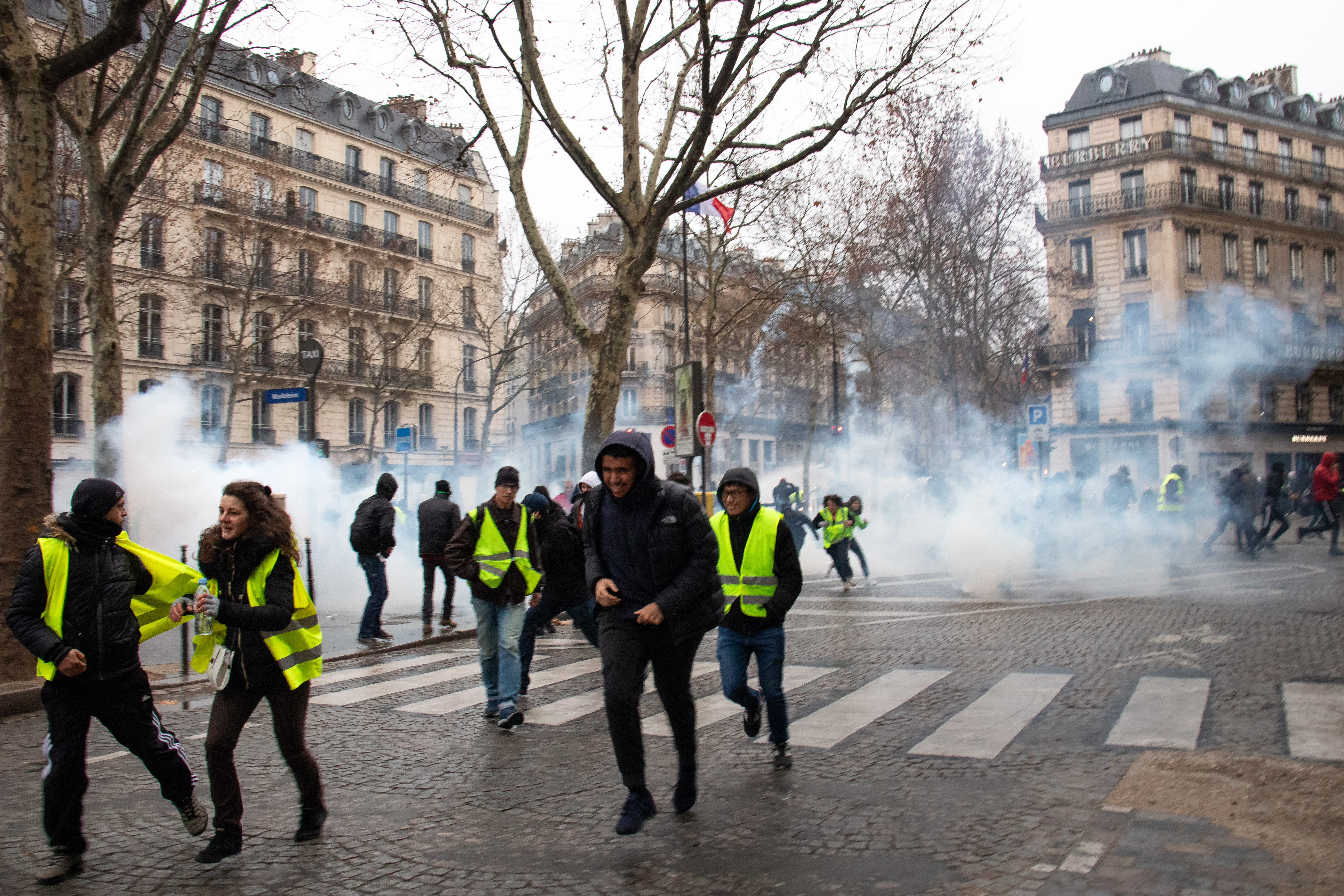 Paris, 08/12/18 - Gilets jaunes "acte 4" Gaz lacrymogène. // Tear gas